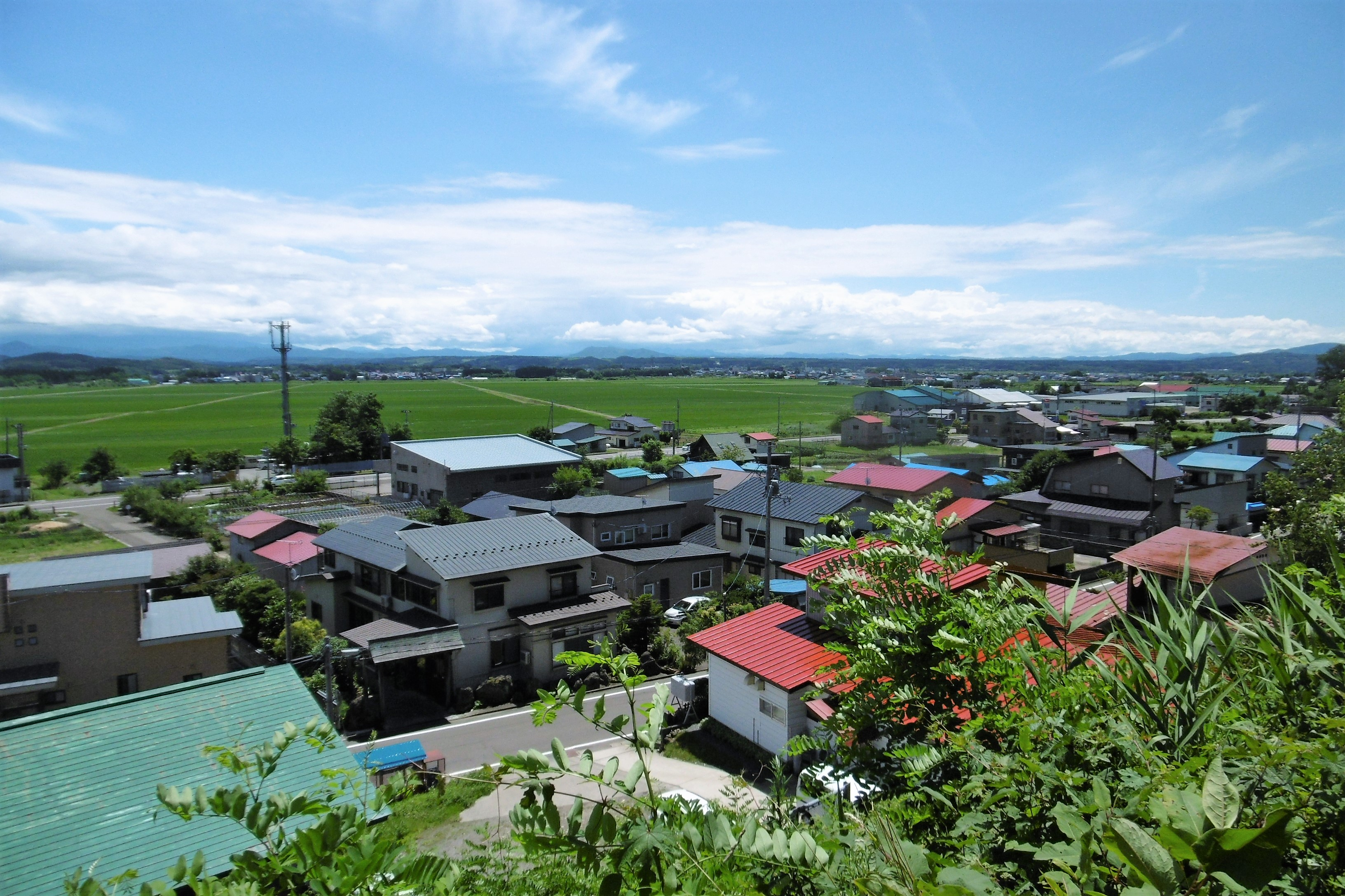 綴子から鷹巣方向を望む：秋田県北秋田市